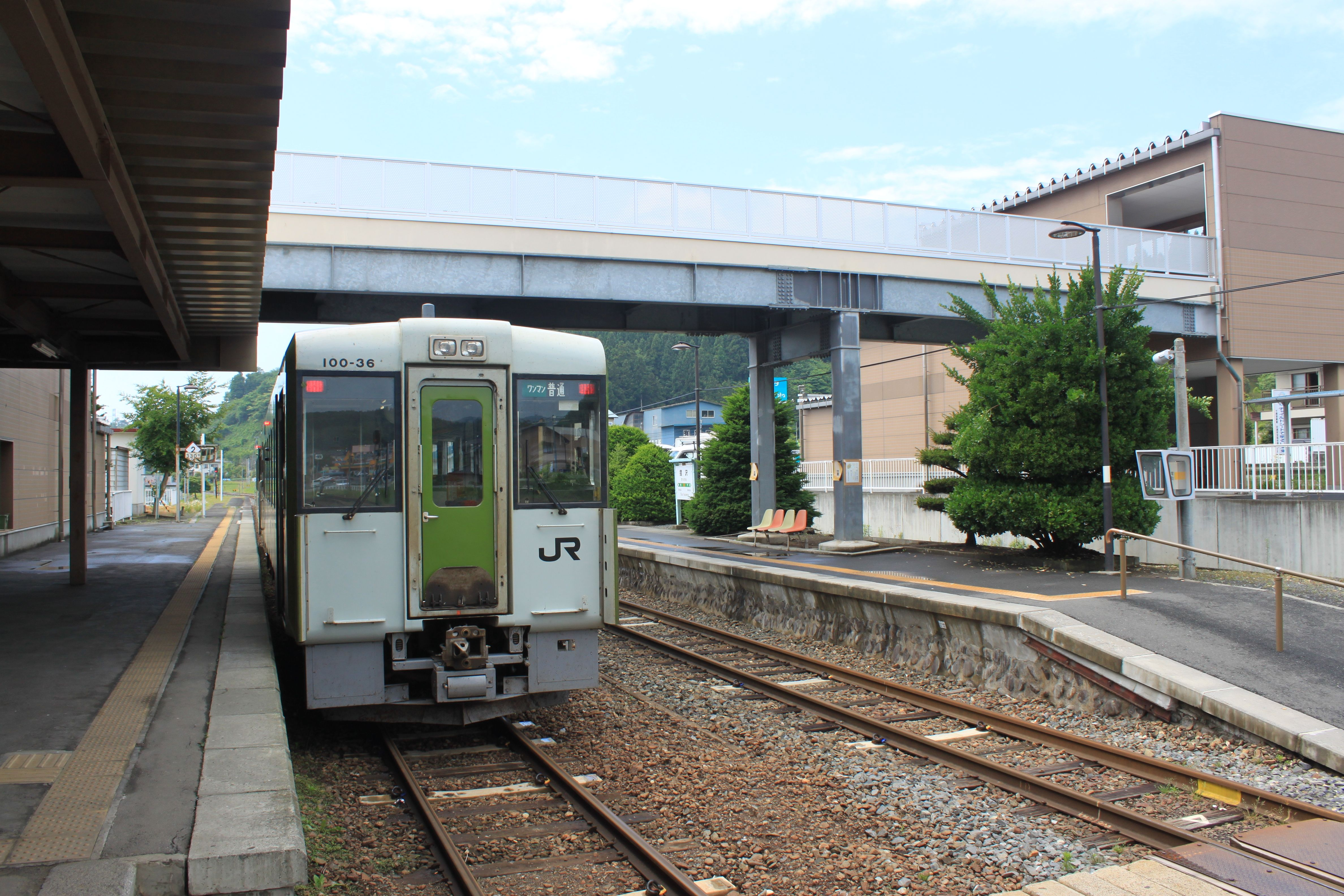 摺沢駅